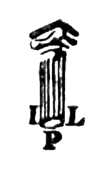 grafika z książki udostępnionej w ramach programu Udostępnianie piśmiennictwa